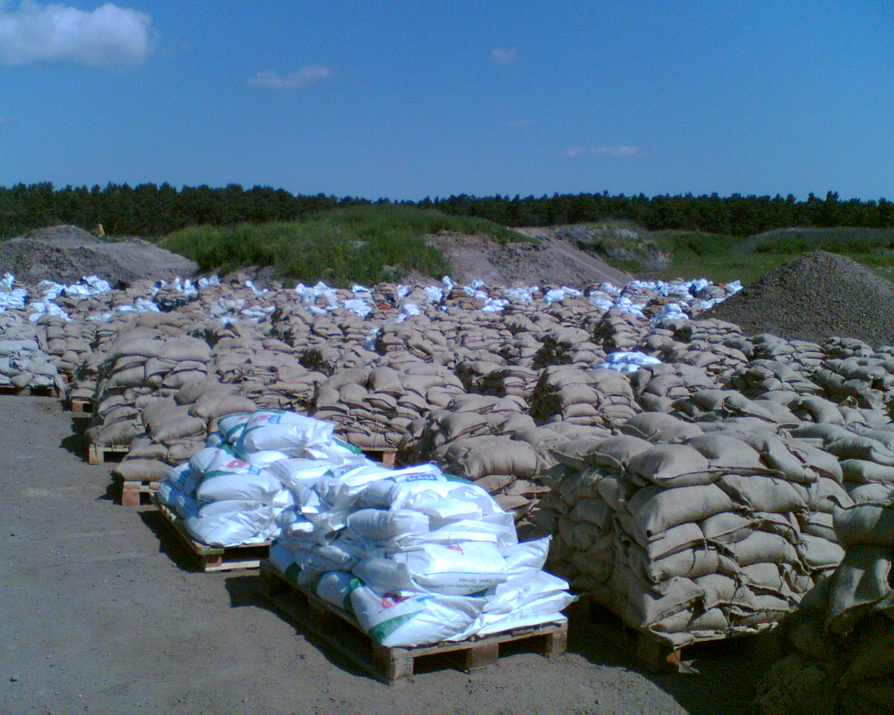 Sandsackpaletten im Bereitstellungsraum bei der Kiesgrube Farsleben im Juni 2013. Fertig zum Transport an den Deich der Elbe.